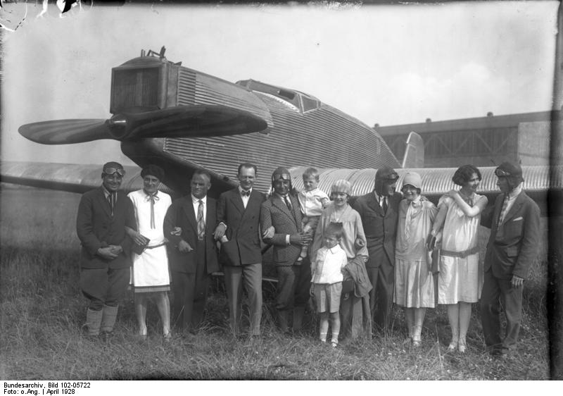 Der Start des deutschen Junkers-Flugzeuges "Bremen" zum Amerikaflug. Die Führer des deutschen Junkers-Ozeanflugzeuges Hauptmann Köhl mit seiner Gattin, rechts neben ihm sein Begleiter der erste Flugpassagier über den Ozean Freiherr von Hünefeld, kurz vor dem Start.